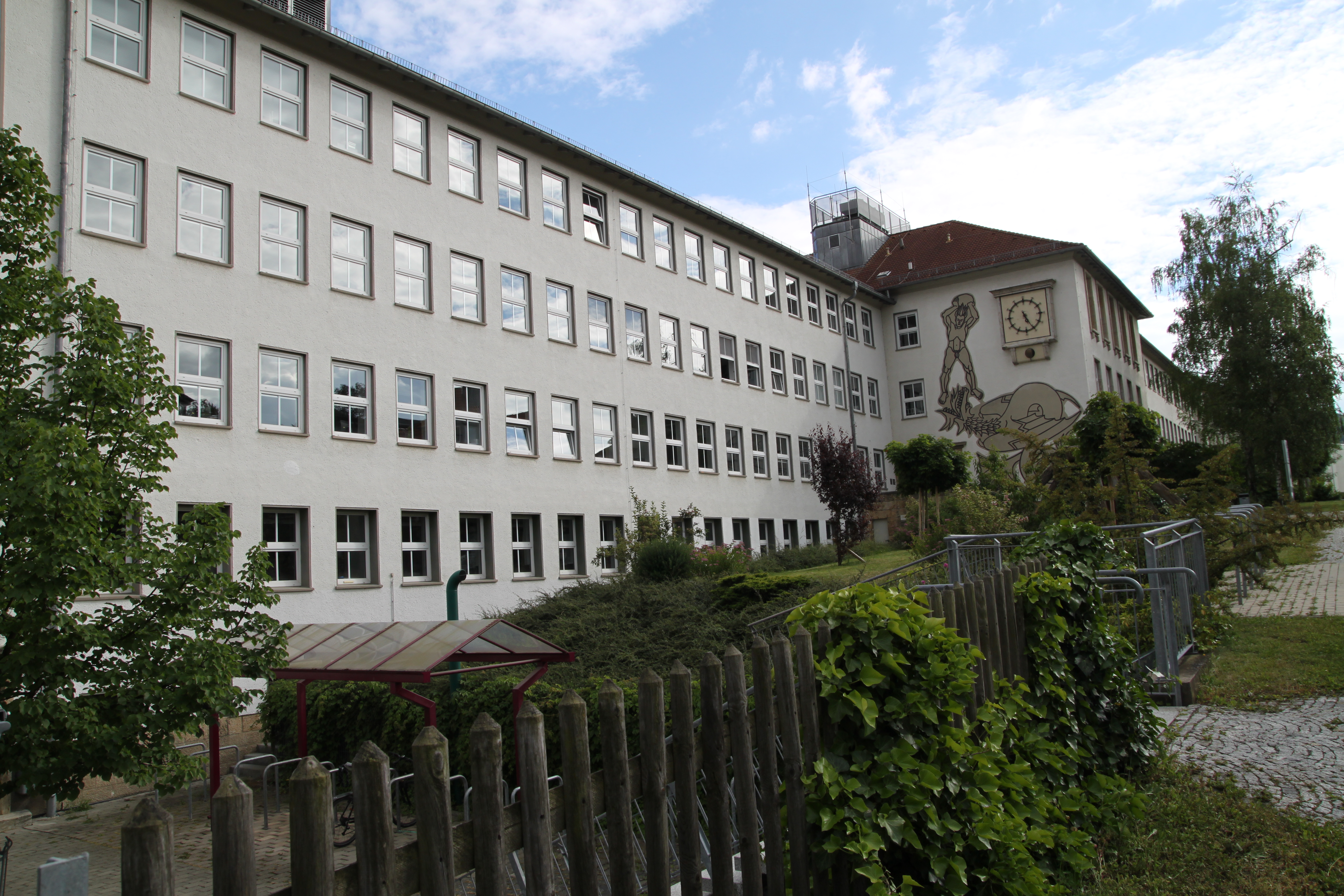 Leibniz-Institut für Alternsforschung (FLI) in Jena